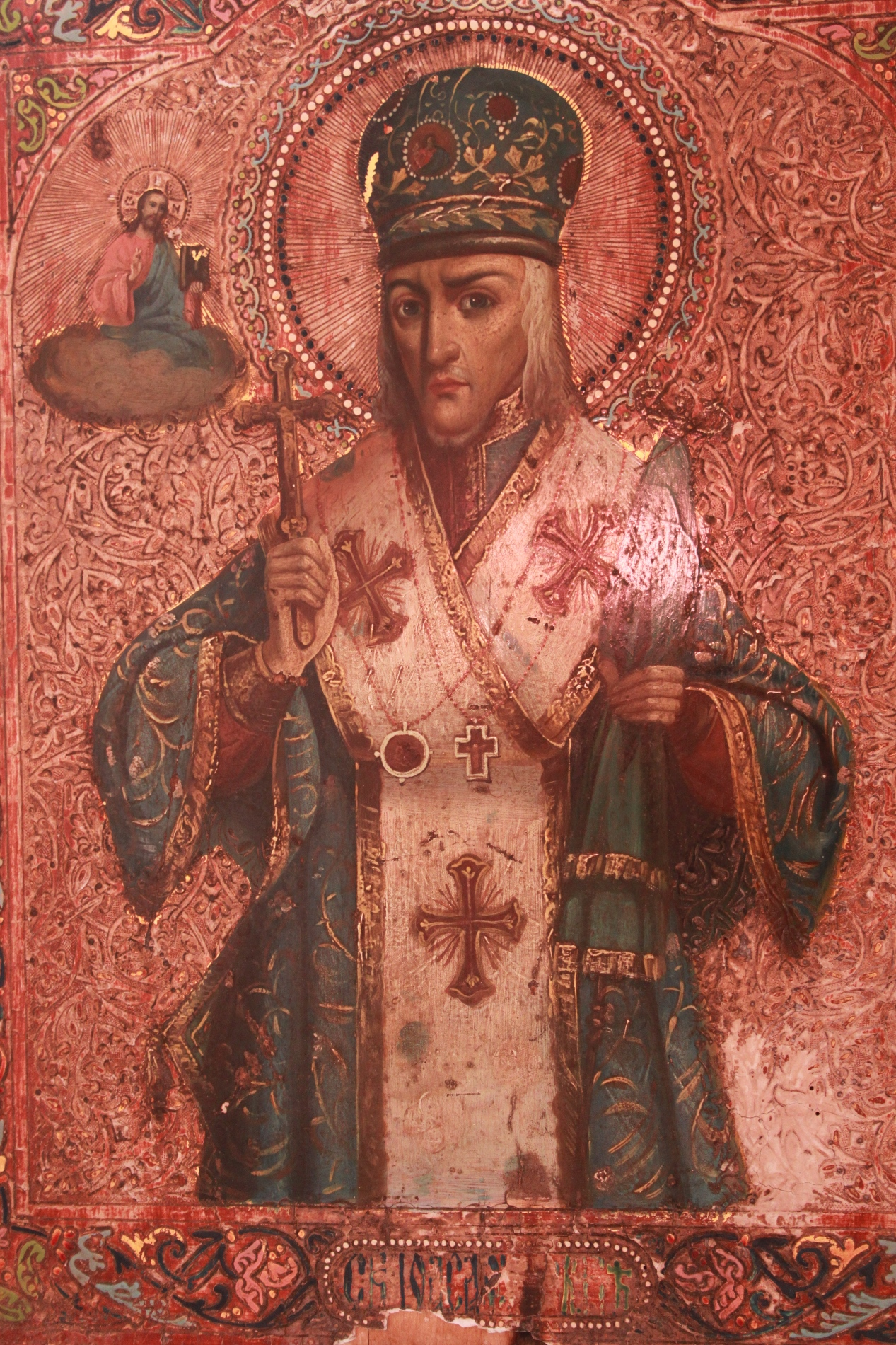 икона святителя Иоасафа, епископа Белгородского (около 1911 г.)